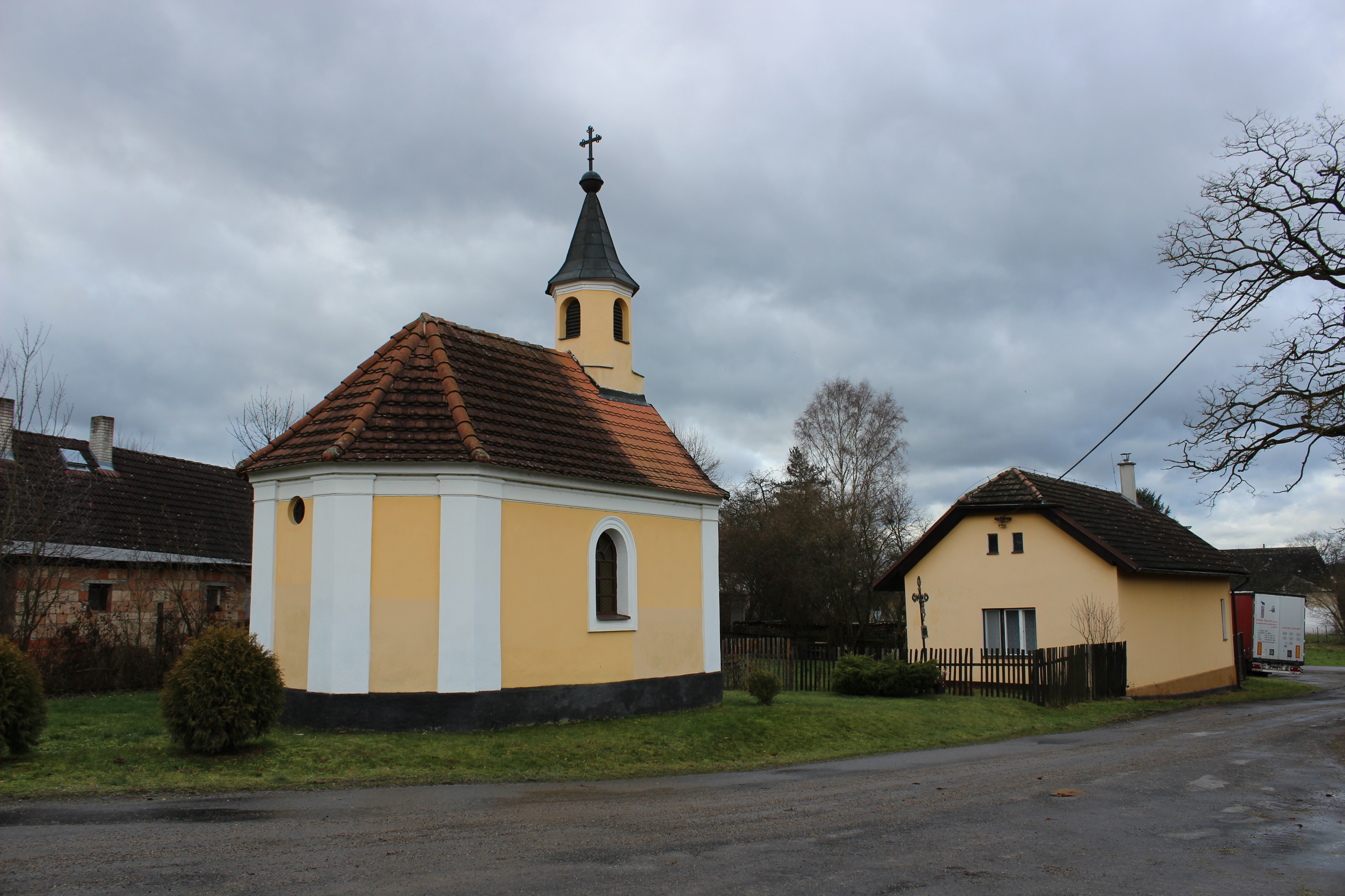 Kaple na návsi. Vyhnanice (Hlavatce). Okres Tábor. Česká republika.